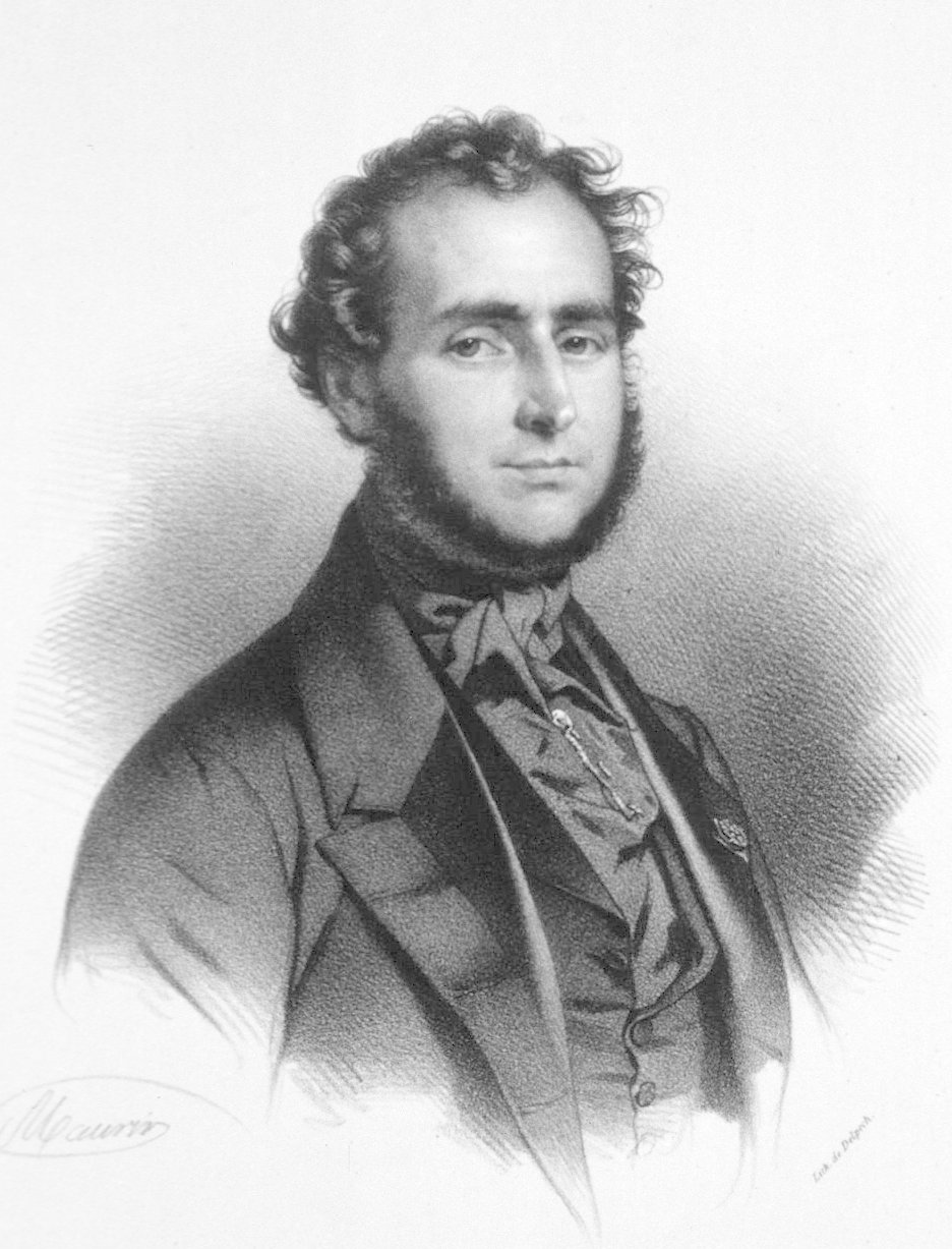 Portrait du chirurgien Jobert de Lamballe (1799-1867), réalisé par l'artiste François Séraphin Delpech, (1778-1825).